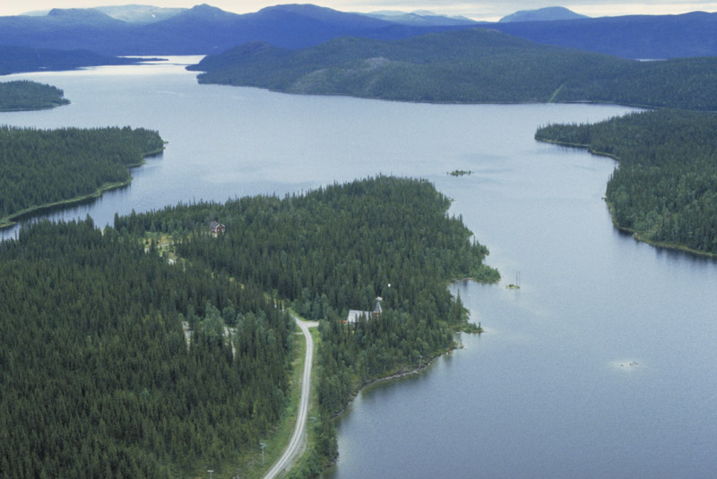 Vojtjajaure kapell (vid bildens mitt), Björkvattensdalen. Bilden är tagen mot (väderstreck): SO Motiv: Vojtjajaure Nyckelord: Flygbilder, Riksintressen Kategori: Insjömiljöer, Kyrkomiljö Vojtjajaure kapell (vid bildens mitt), Björkvattensdalen. Bilden är tagen mot (väderstreck): SO.